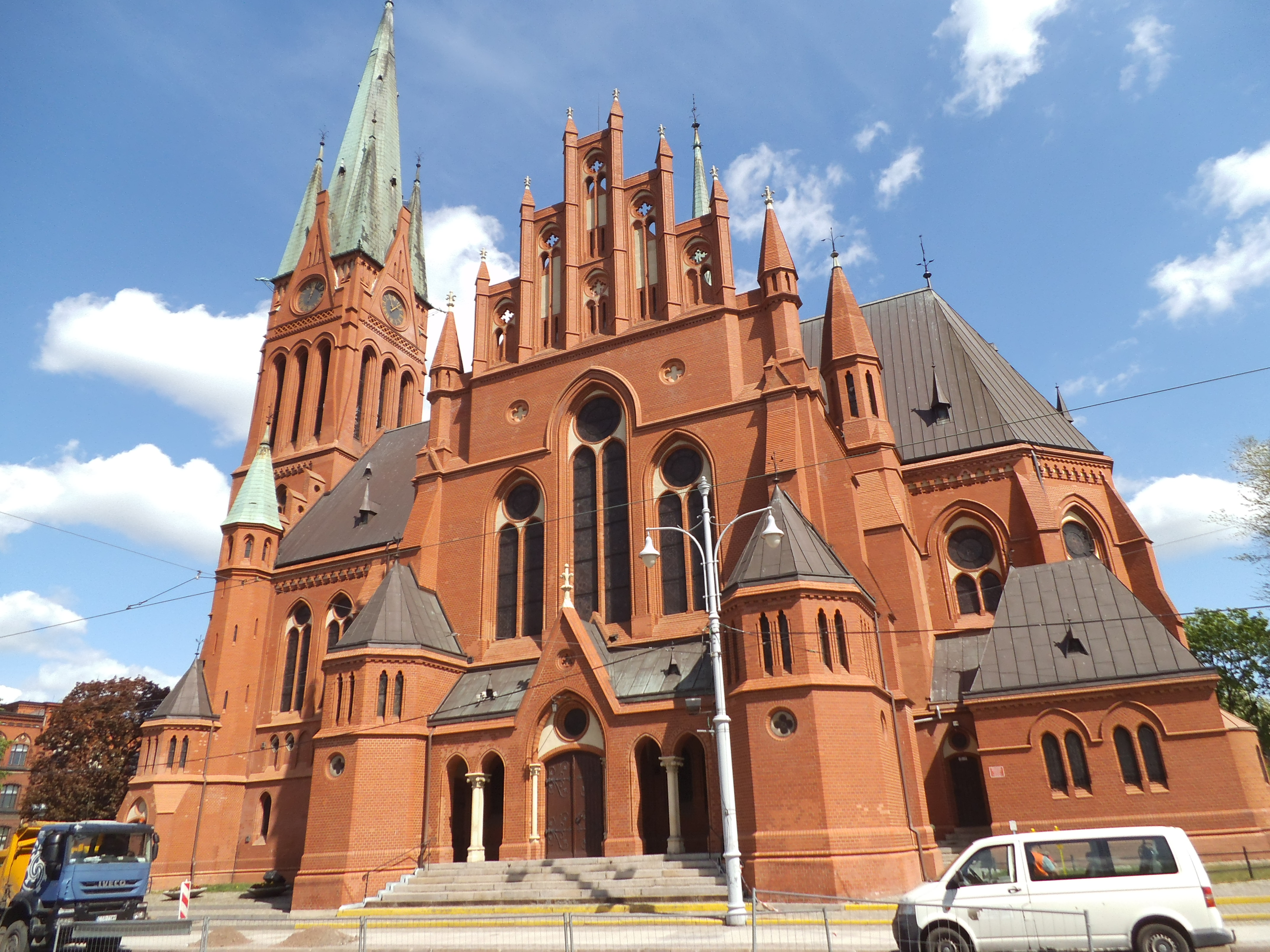 Toruń, pl. św. Katarzyny - dawny kościół ewangelicki, obecnie rzymskokatolicki parafialny garnizonowy p.w. św. Katarzyny, 1894-1897, pl. św. Katarzyny